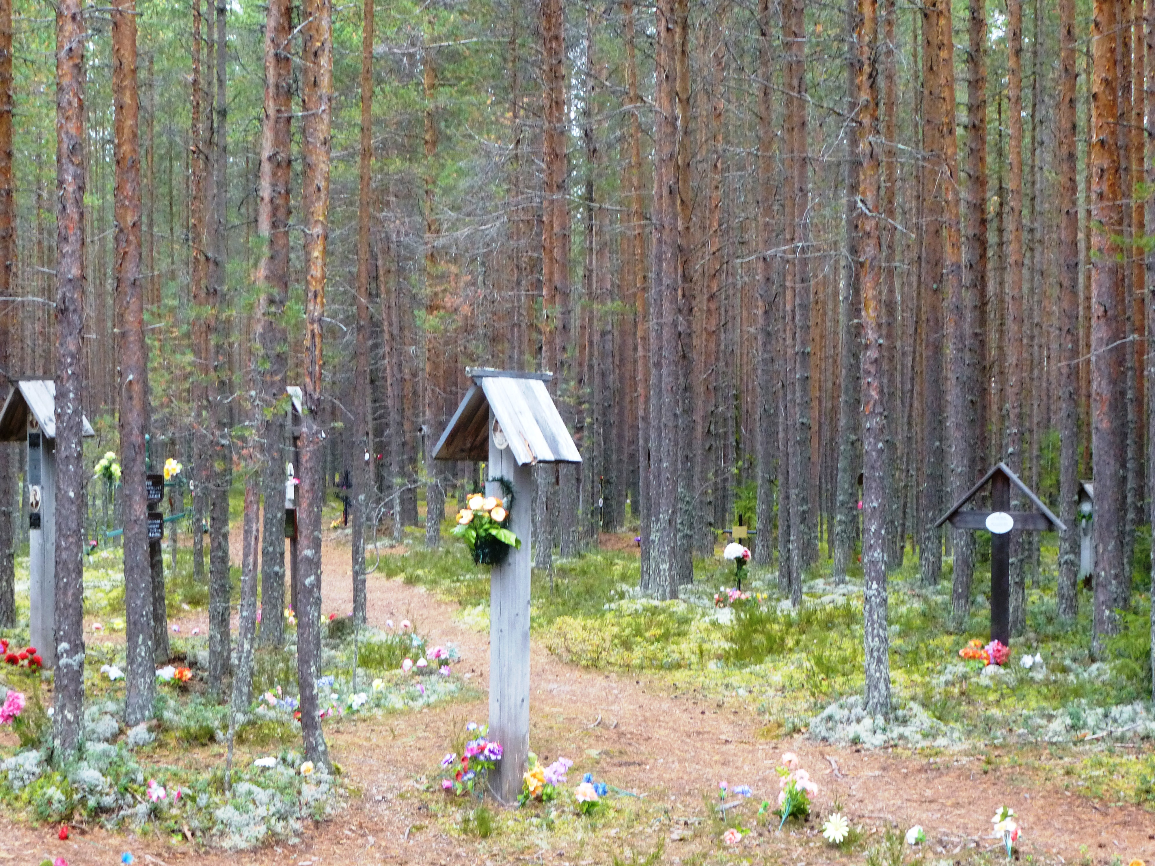 Памятные кресты на месте массовых казней в урочище Сандормох вблизи г. Медвежьегорск, Республика Карелия.